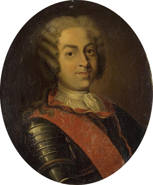 Portrait of Roland-Michel Barrin de La Galissonière (1693-1756)